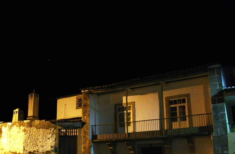 Casa do Barão de Proença-a-Velha (fachada norte)